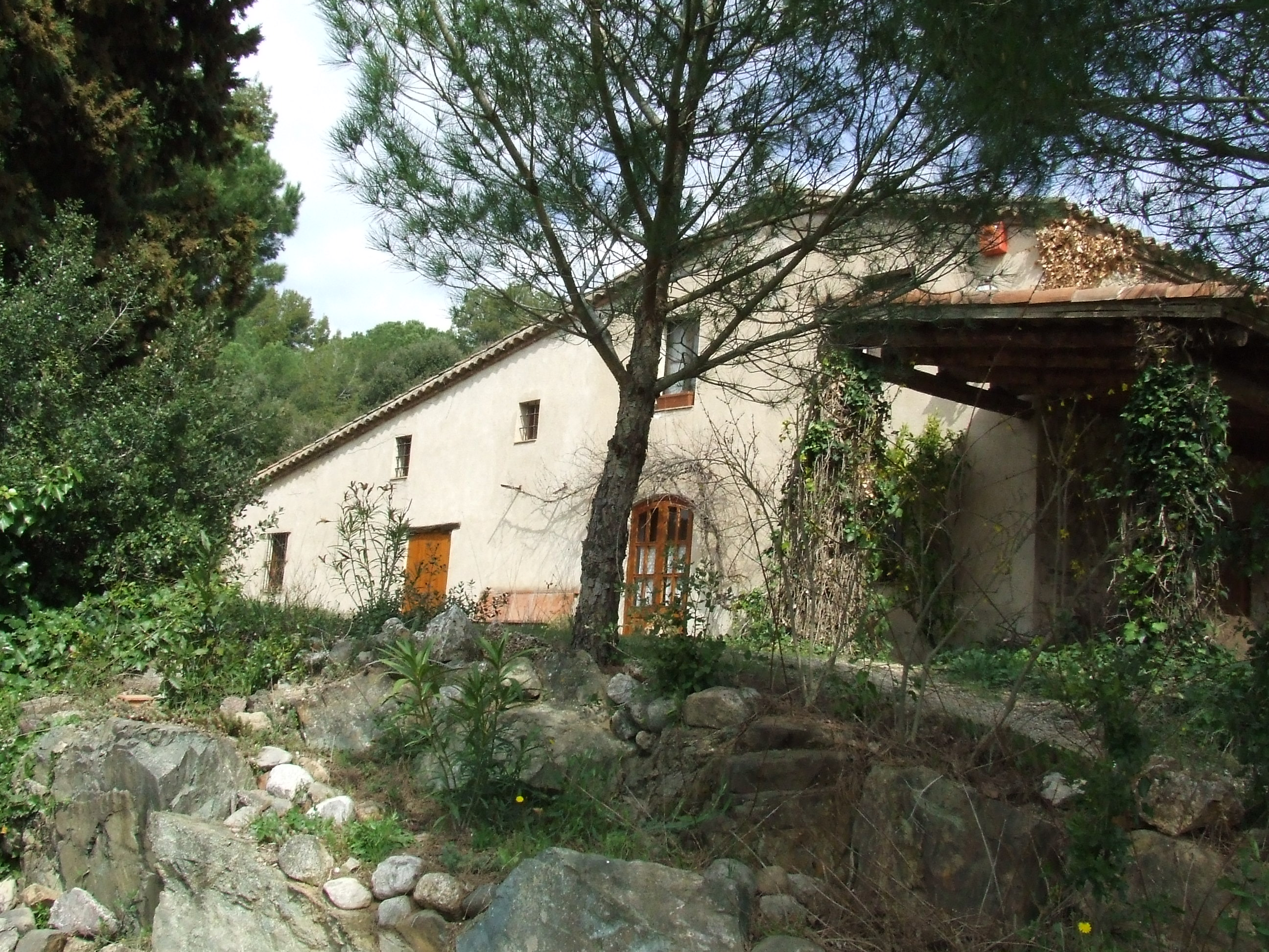 Can Mai-hi-són (Bigues, Bigues i Riells, Vallès Oriental)